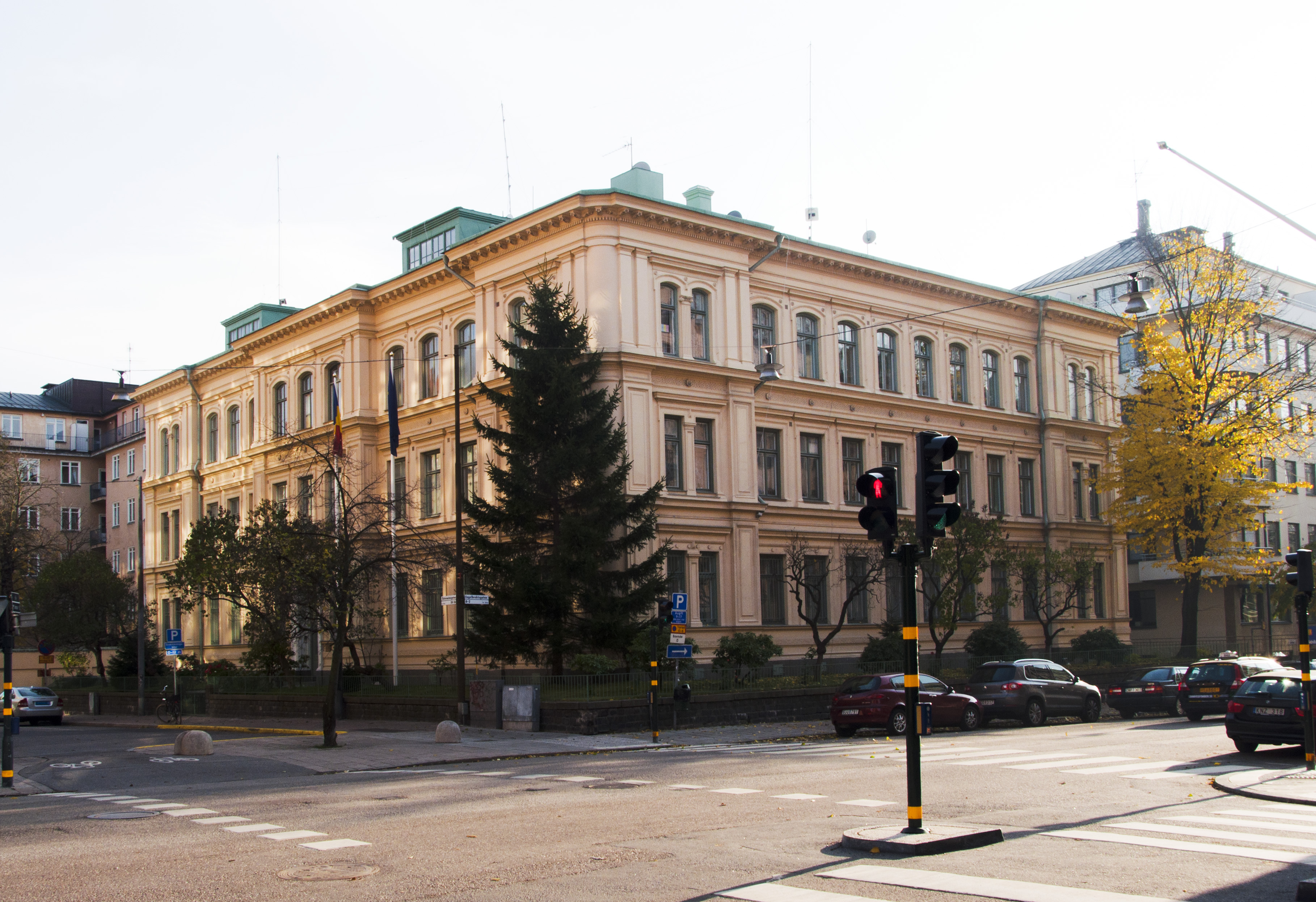 Rumänska ambassaden. Östermalmsgatan 36. Byggnadsår 1881-82, arkitekter Axel & Hjalmar Kumlien, byggherre och byggmästare D Forssell. Beboddes under 1900-talets förra hälft av Sven Palme